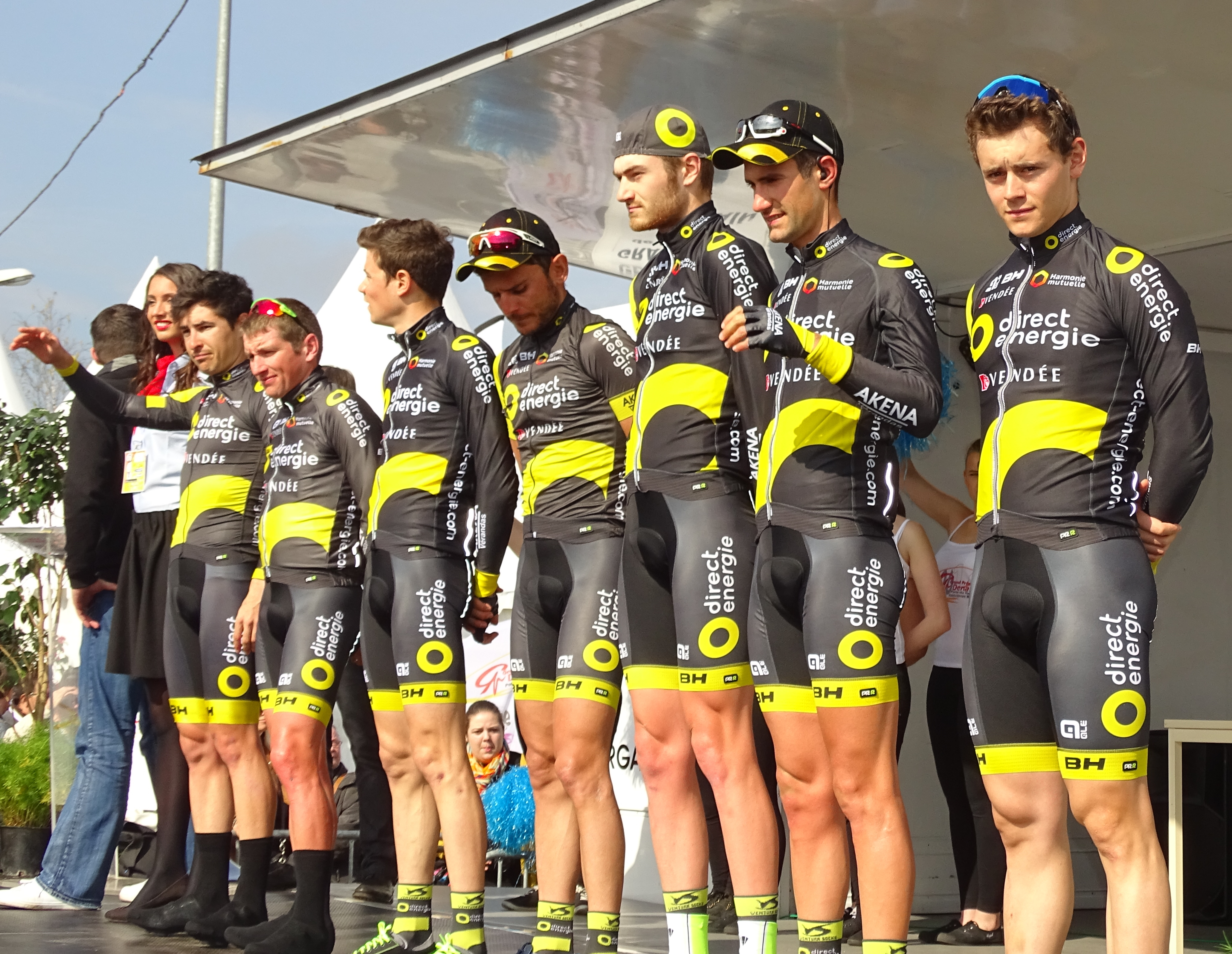 Reportage réalisé le jeudi 14 avril à l'occasion du départ et de l'arrivée du Grand Prix de Denain 2016 à Denain, Nord, Nord-Pas-de-Calais-Picardie, France.